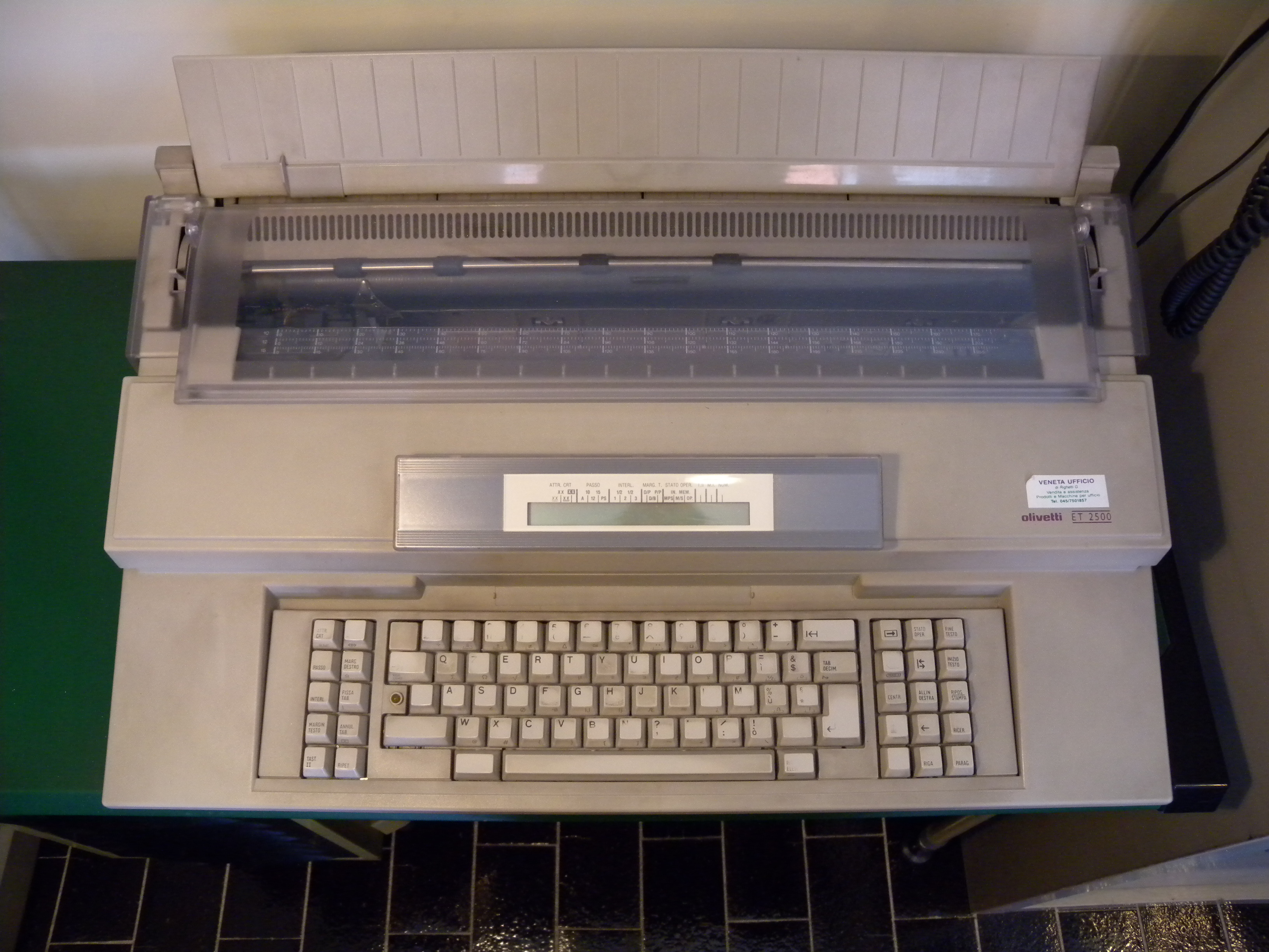 Foto dall'alto della macchina da scrivere Olivetti ET 2500